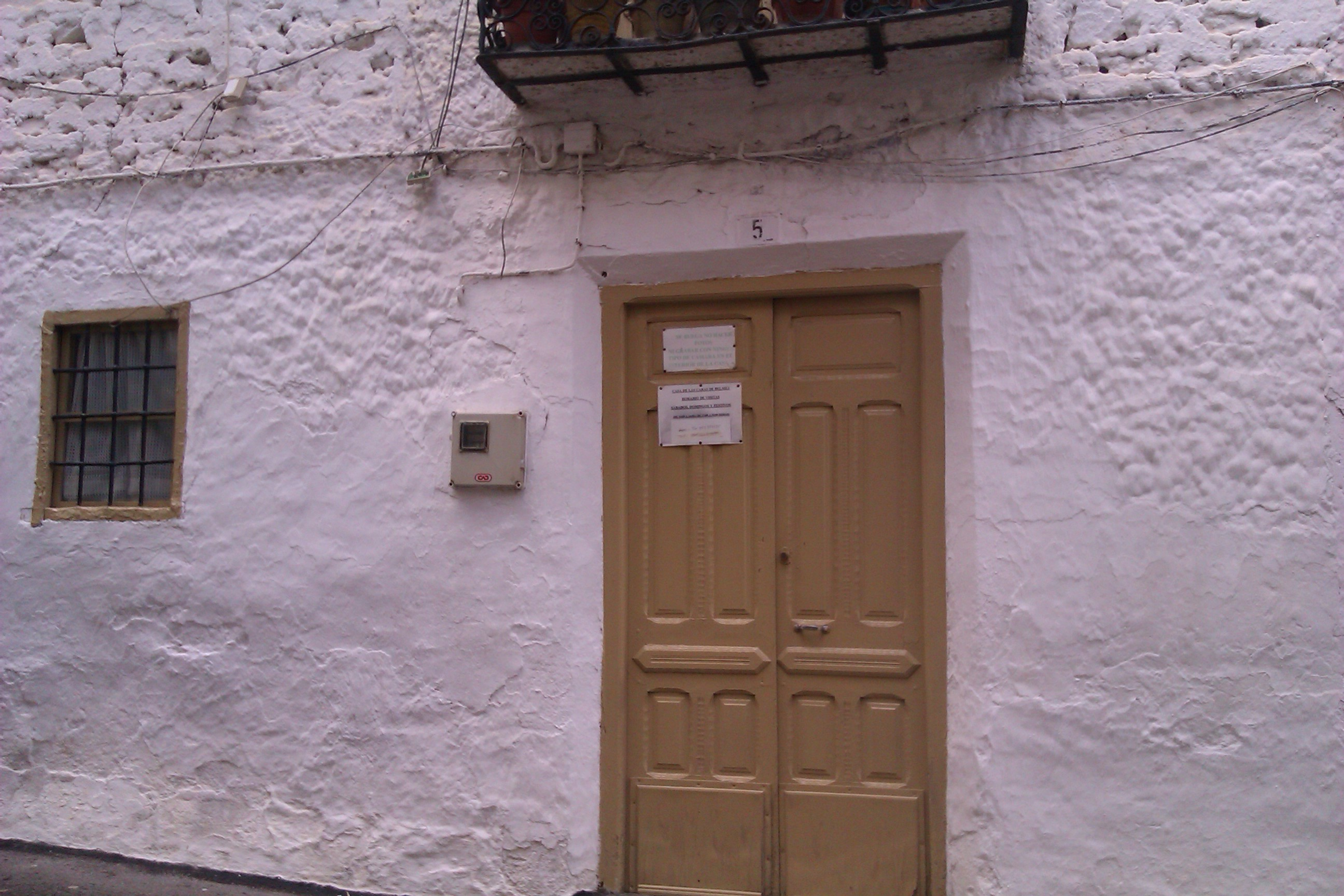 Casa de María Gómez en Bélmez de la Moraleda (Jaén, España). Escenario del fenómeno supuestamente paranormal llamado Caras de Bélmez.